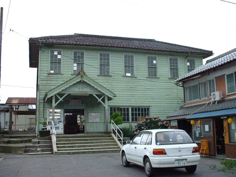 新八日市駅舎 大正2年建築 滋賀県東近江市